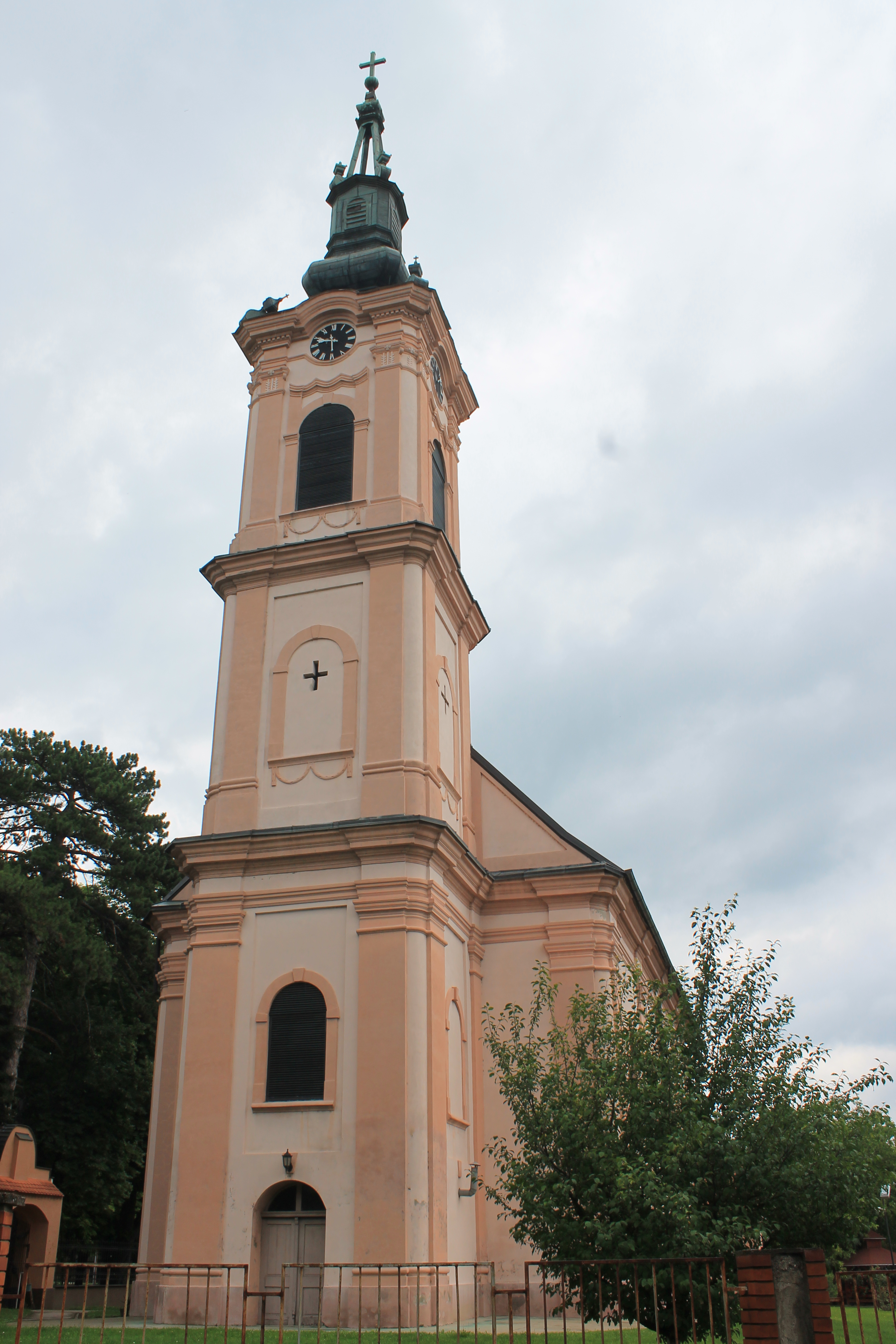 Crkva Sv. Nikole (Erdevik)